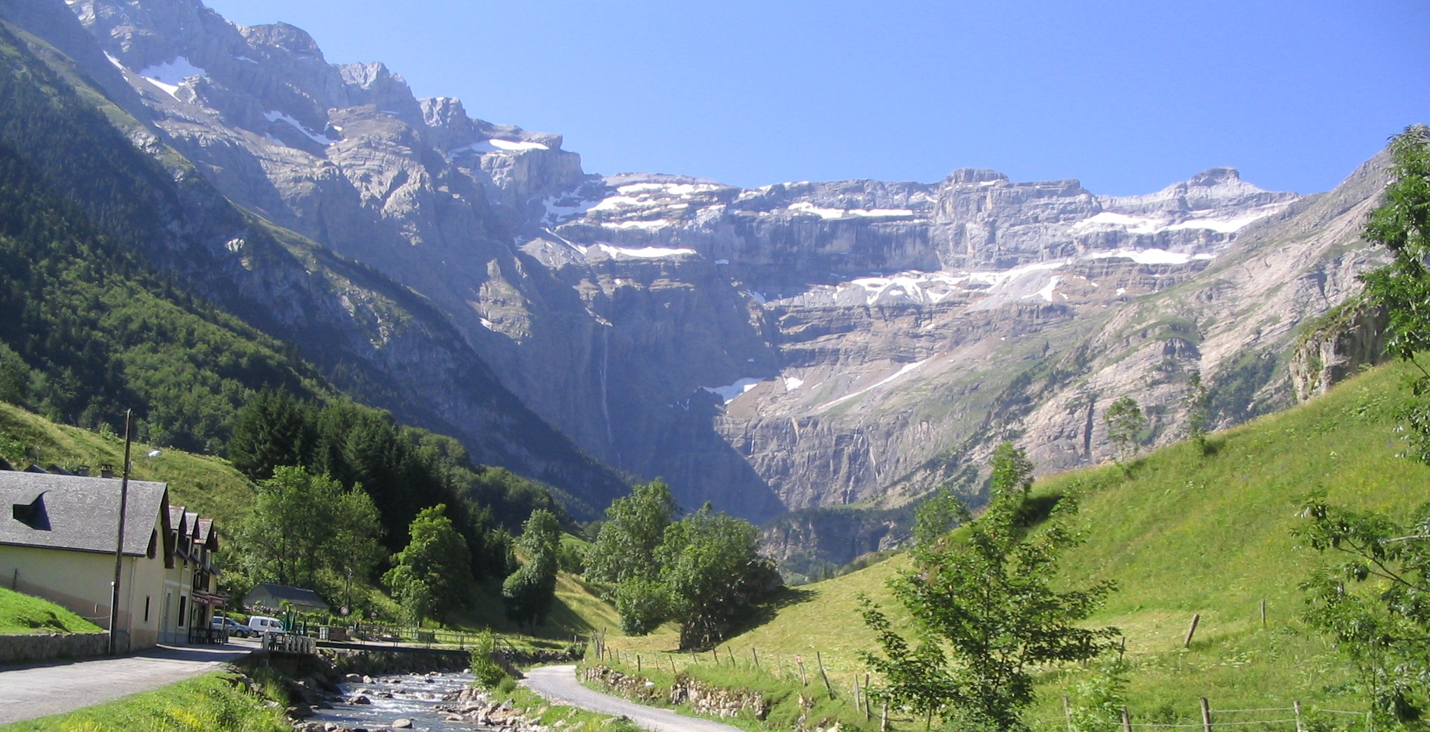 Circo glaciar de Gavarnie, Pirineos franceses